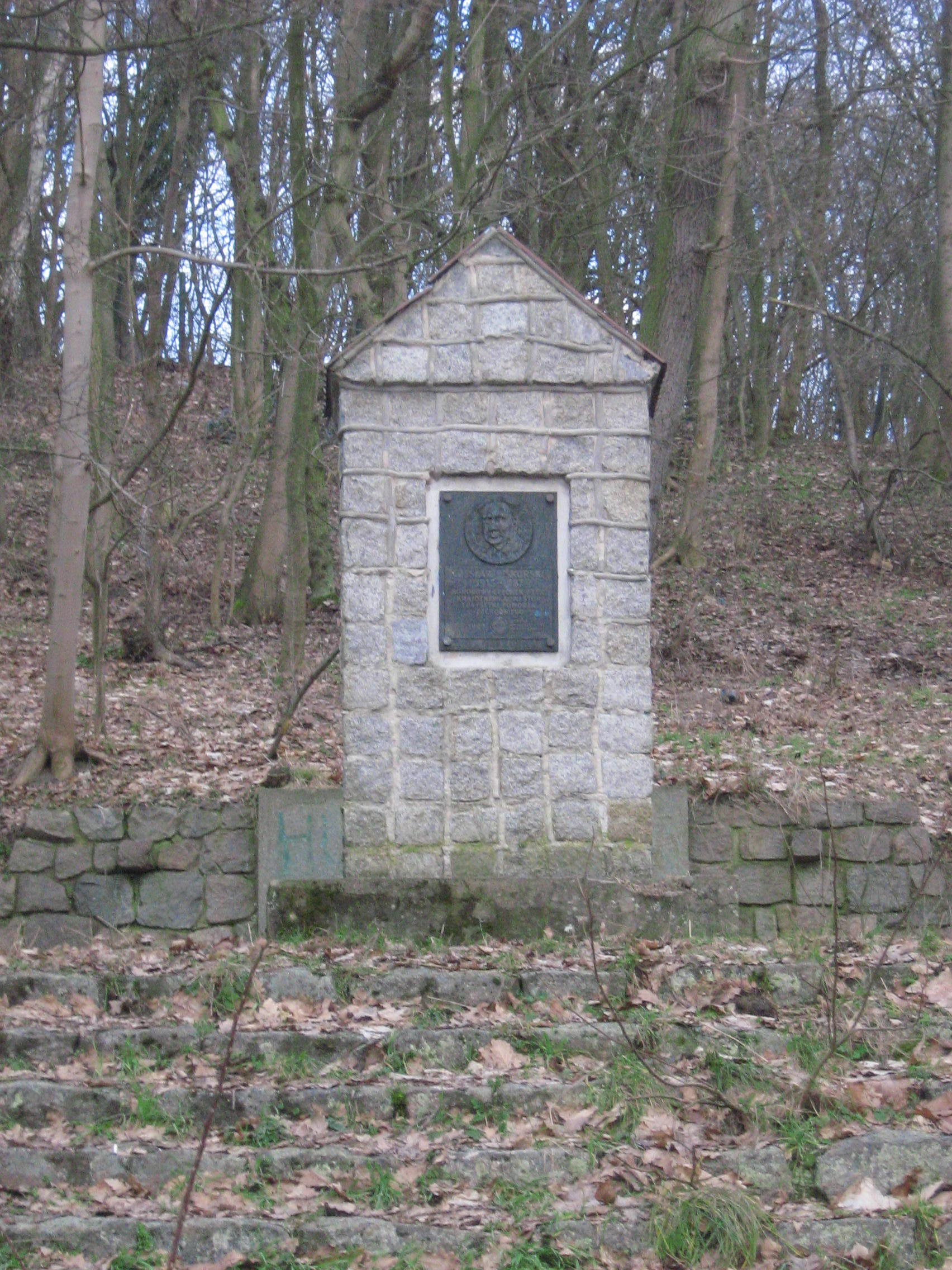 Pomnik poświęcony Czesławowi Piskorskiemu